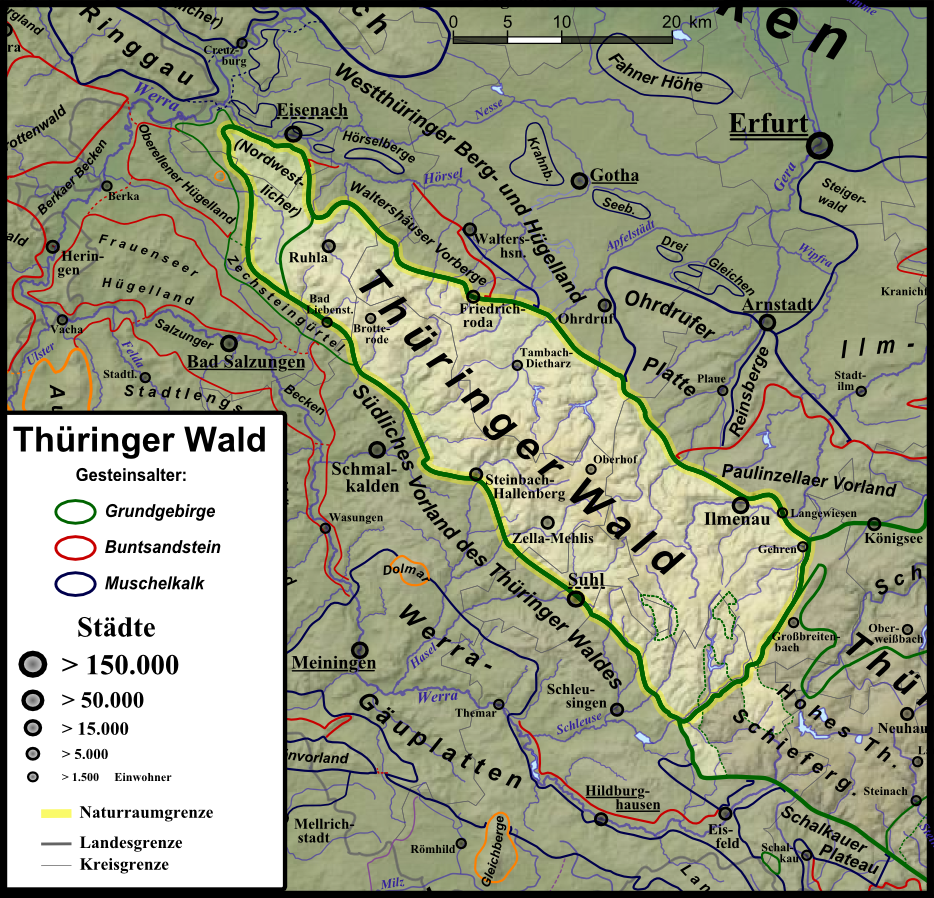 Naturraumkarte des Thüringer Waldes; aufgehellt sind auch die halbinselartig ins Thüringer Schiefergebirge ragenden Rotliegend-Gebiete Masserberger Scholle und Crocker Scholle.